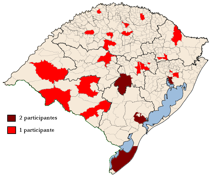 Participantes do Gauchão de Segunda Divisão